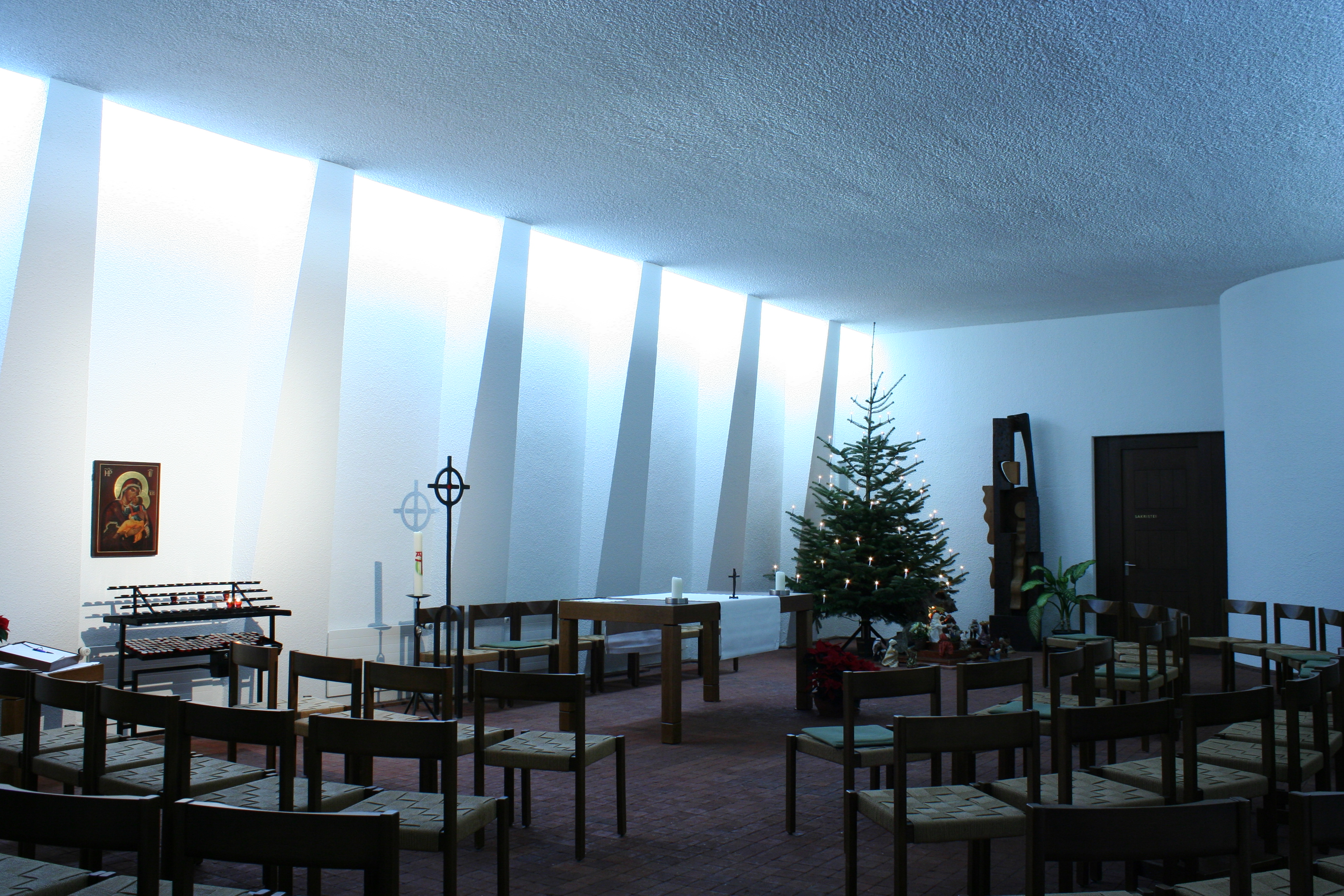 Römisch-katholische Pfarrkirche St. Ulrich Winterthur-Rosenberg, Werk von Ro Studer-Koch Marienkapelle